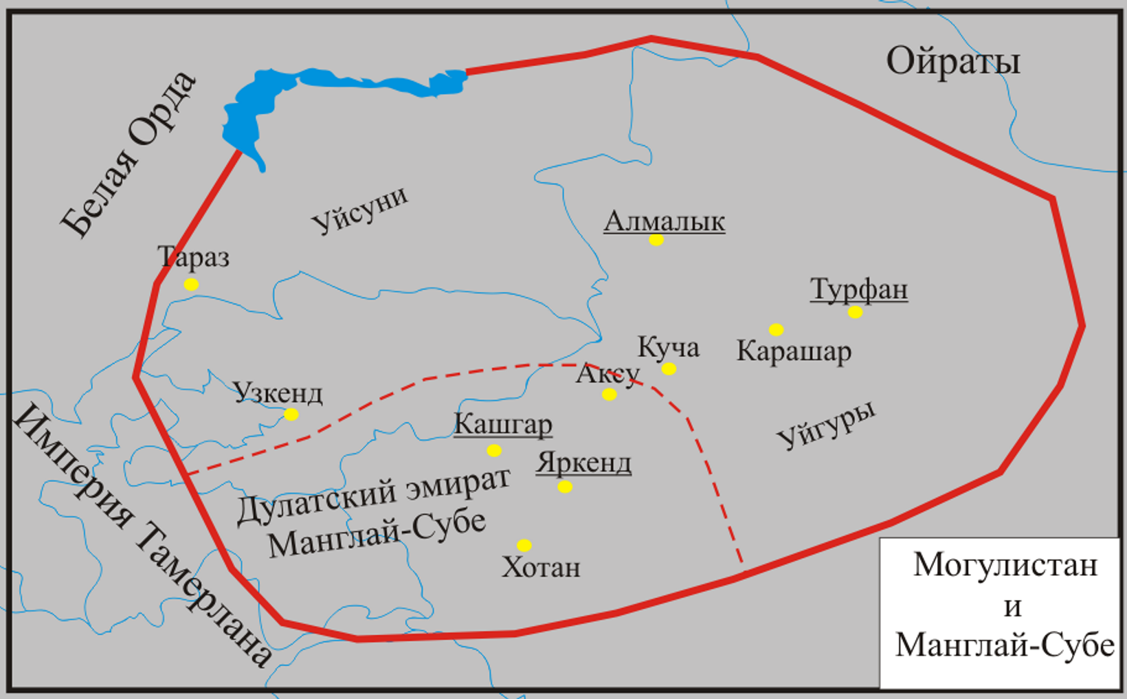 Карта Могулистана